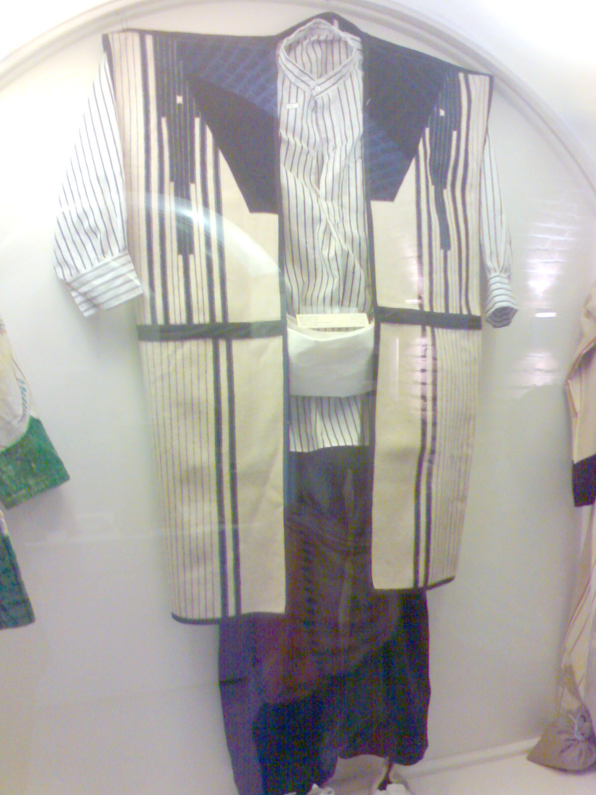 تن پوش نجیب مردان بختیاری